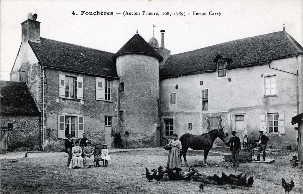 ancien prieuré de Fouchères devenu une femre.